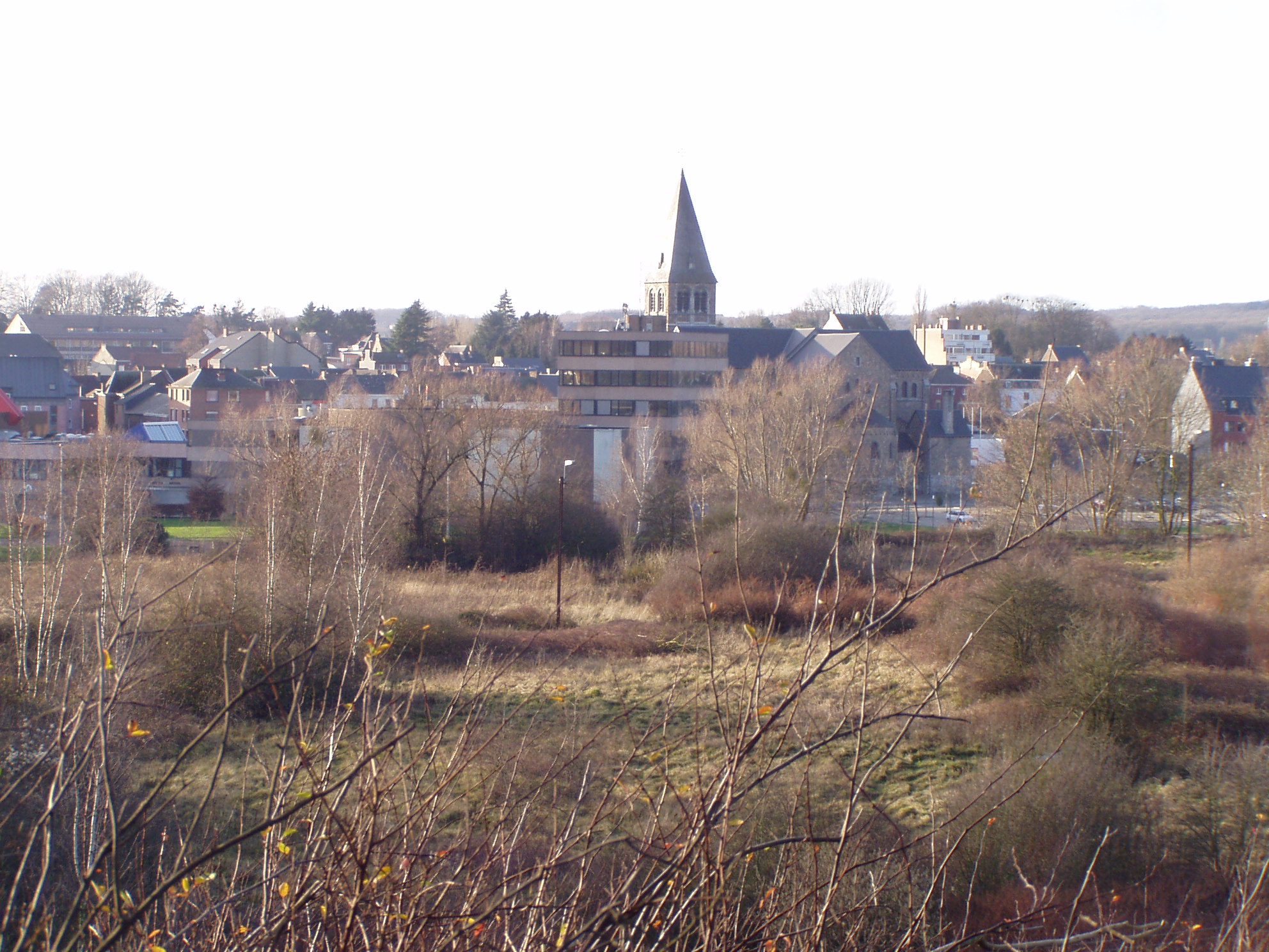 Le chemin menant au Cimetière Français donne un bon point de vue sur le centre d'Auvelais, l'Eglise St Victor et l'arrière de l'Hôtel de Ville.